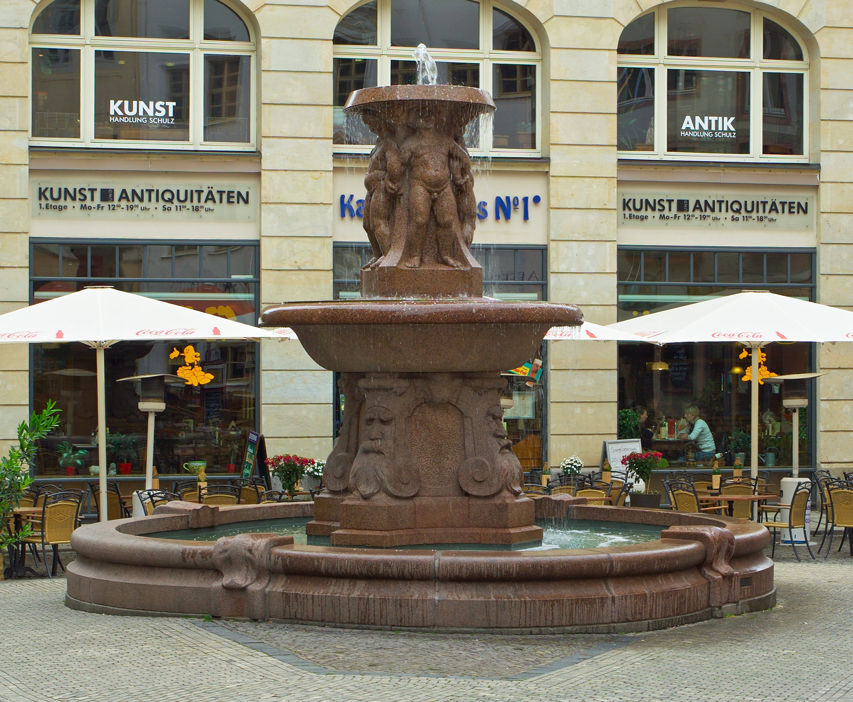 Lipsia-Brunnen, dahinter das Lipsia-Haus, Leipzig 2011.